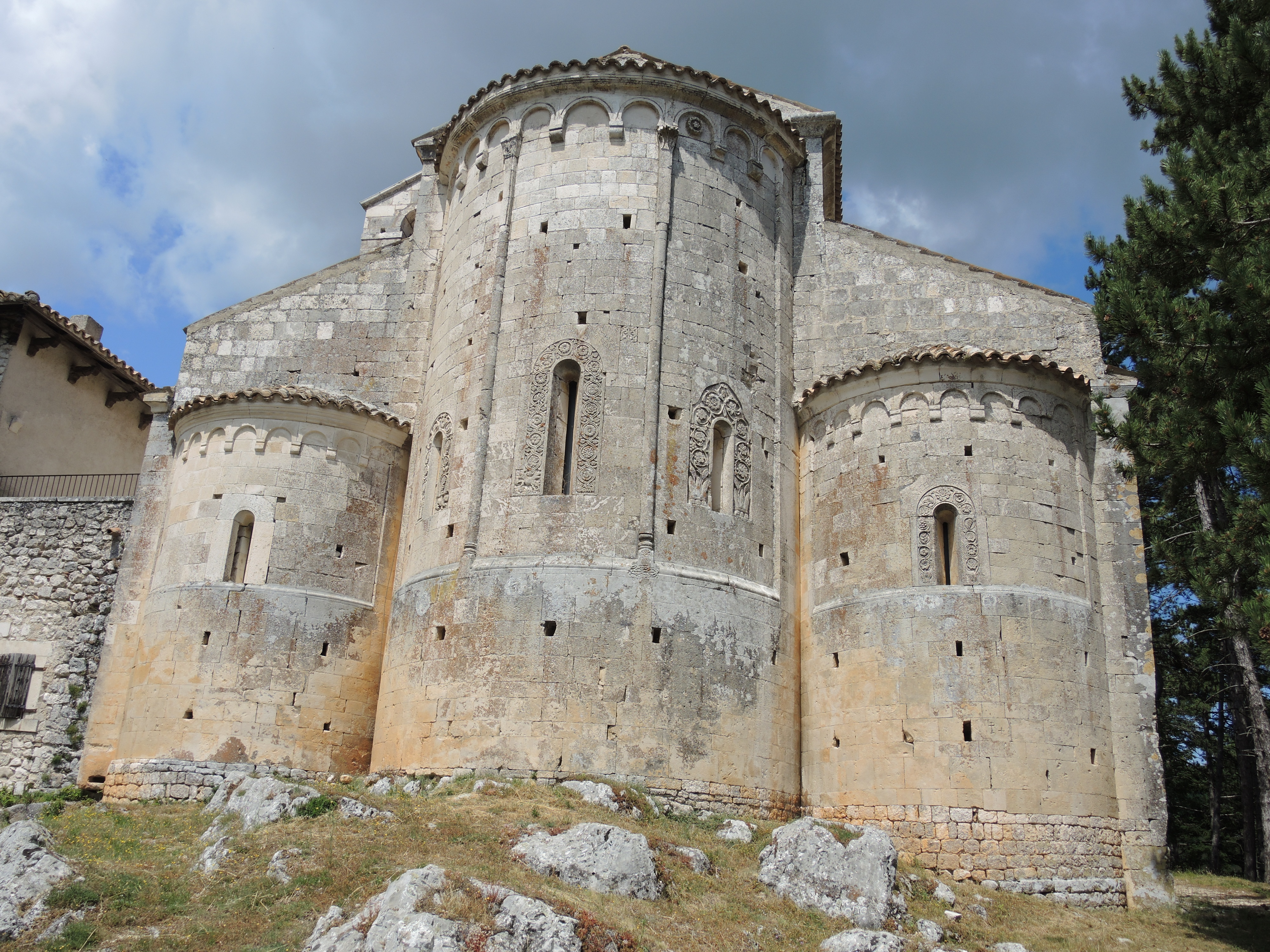 Bominaco: Abbazia di Santa Maria Assunta